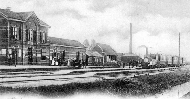 ansichtkaart Station Neede (1900)